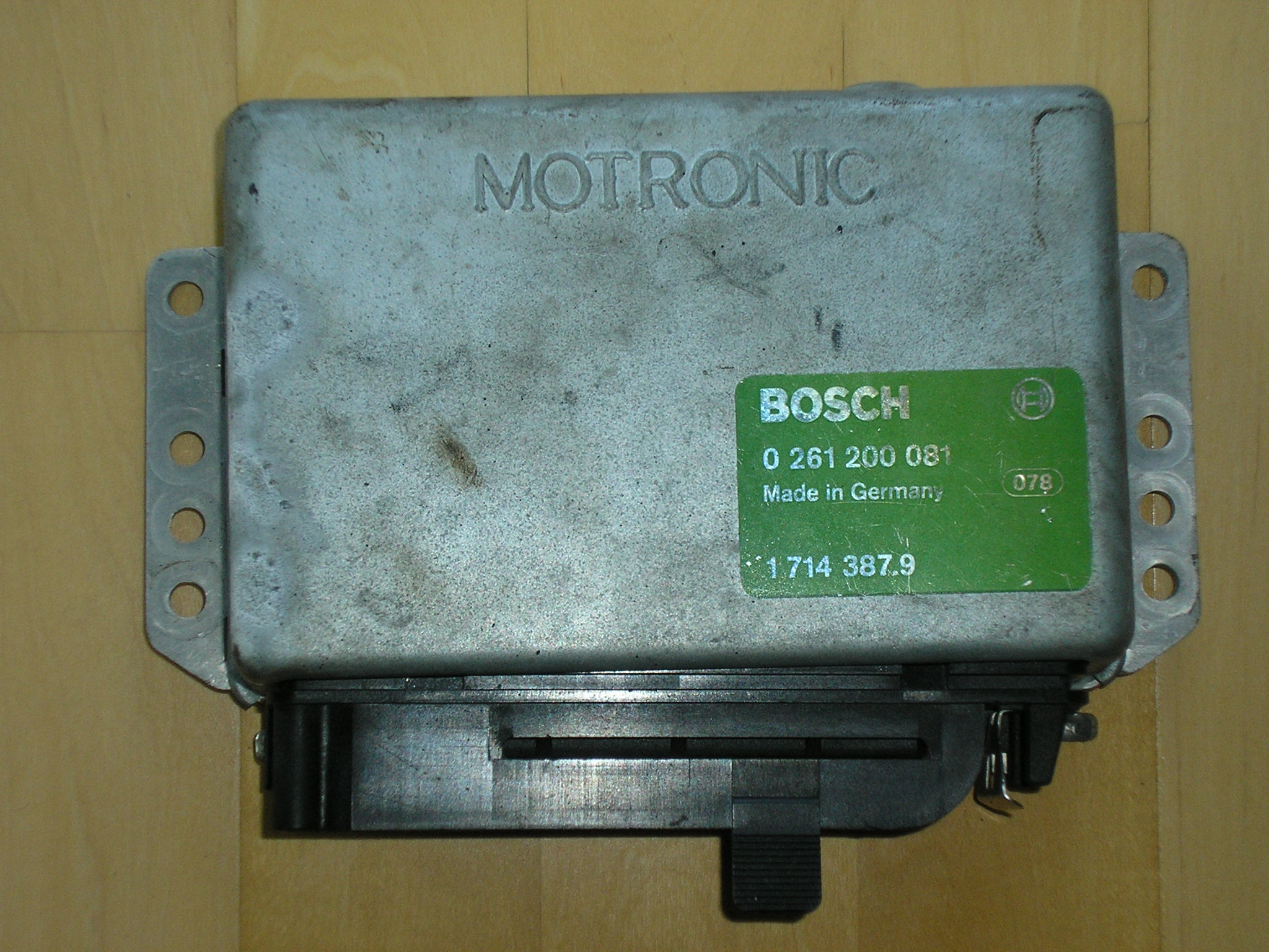 Steuergerät der Bosch-Motronic aus einem BMW E 30 (325 ohne Kat)